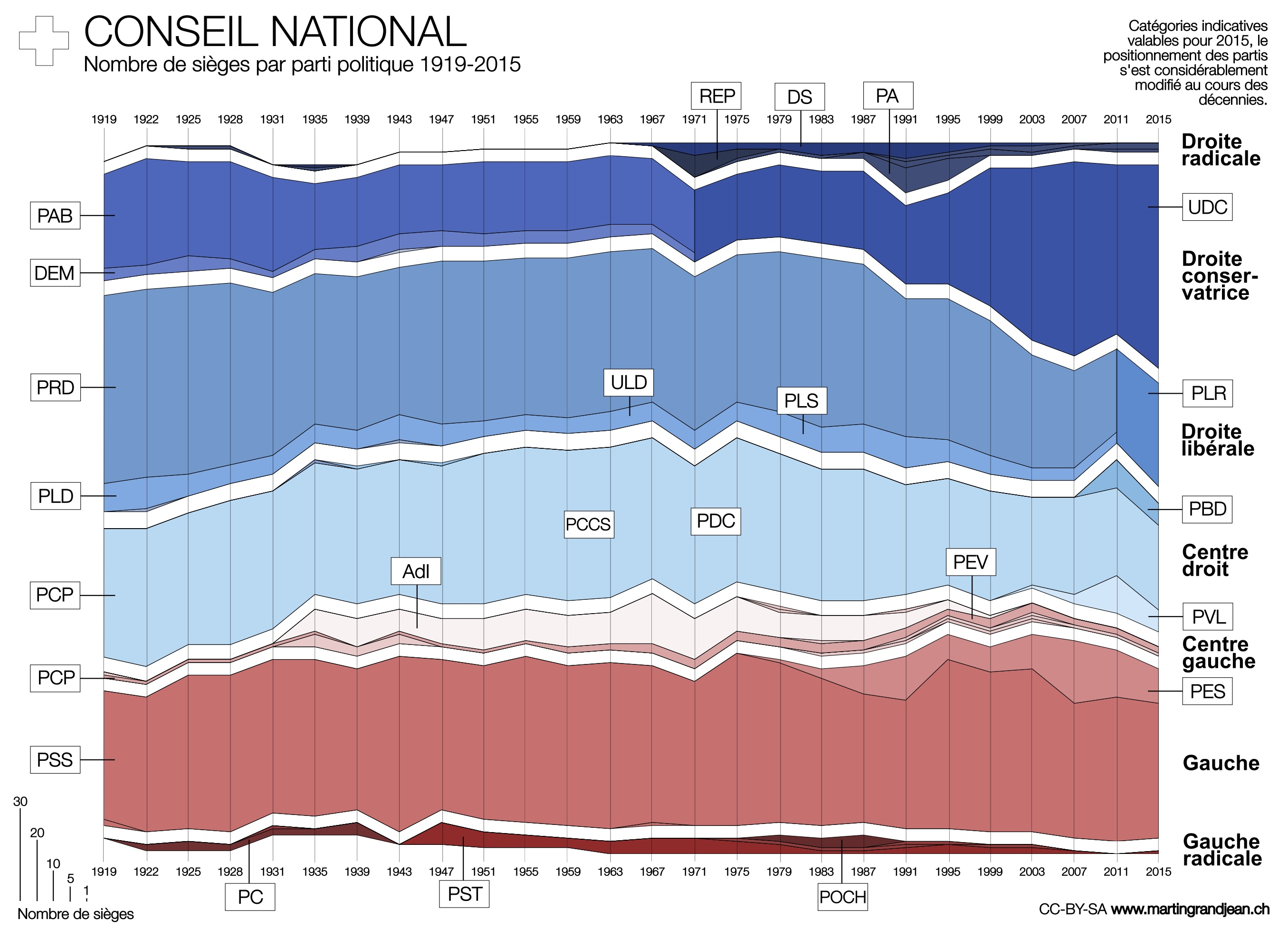 Nombre de sièges par parti politique au Conseil national (Parlement Suisse) 1919-2015 et évolution du rapport gauche/droite.